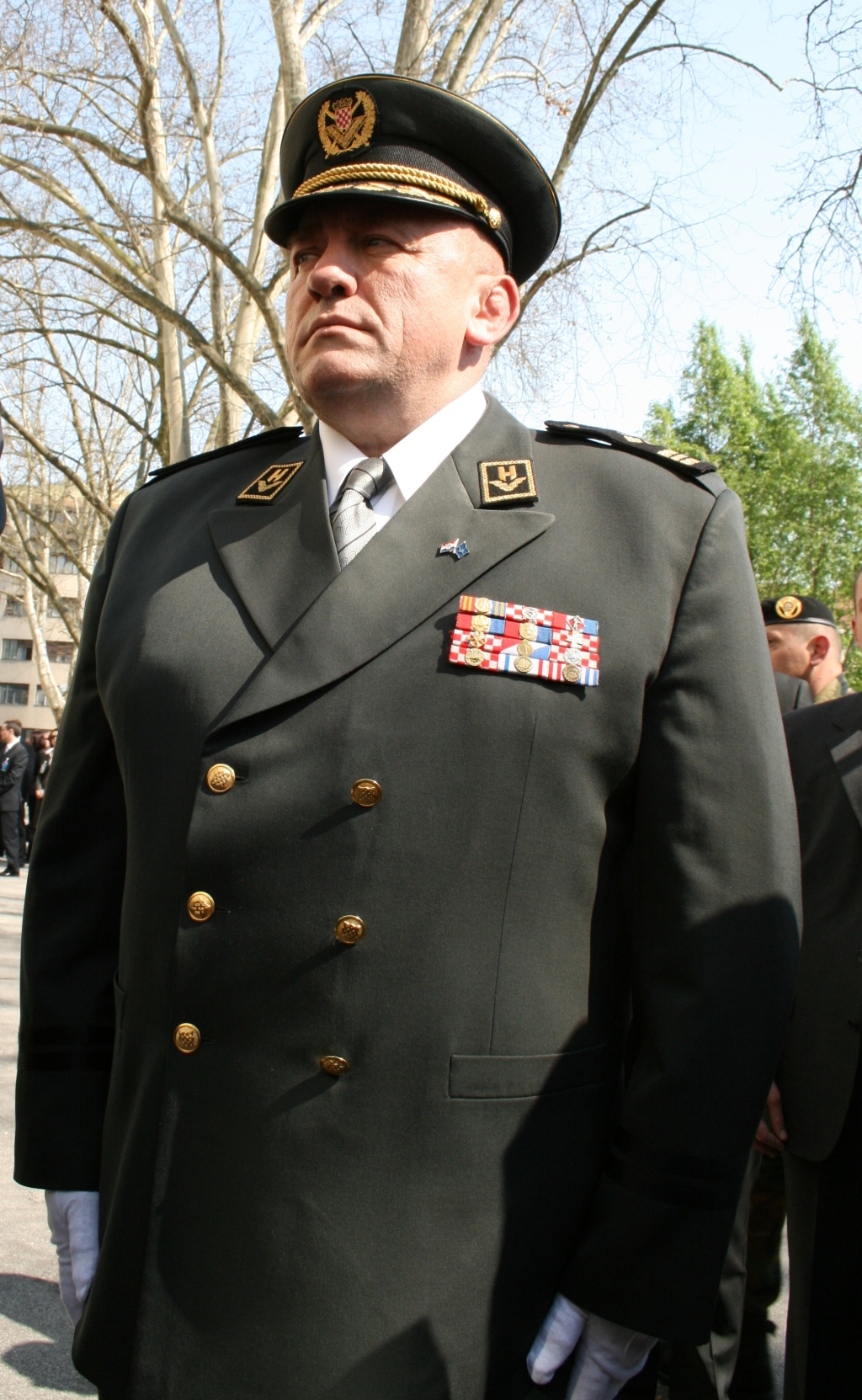 Josip Lucić na svečanosti podizanja NATO-ve zastave ispred zgrade MORH-a u Zagrebu.